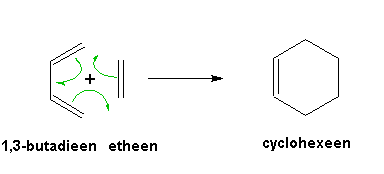 wiki de; vertaald (deel ervan) bron: door